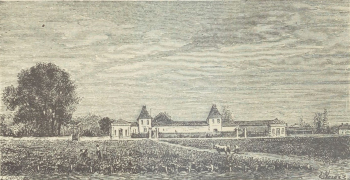 Illustration du Château Paveil de Luze dans l'ouvrage Bordeaux et ses vins (7ème édition) de Charles Cocks et Edouard Féret publié en 1898